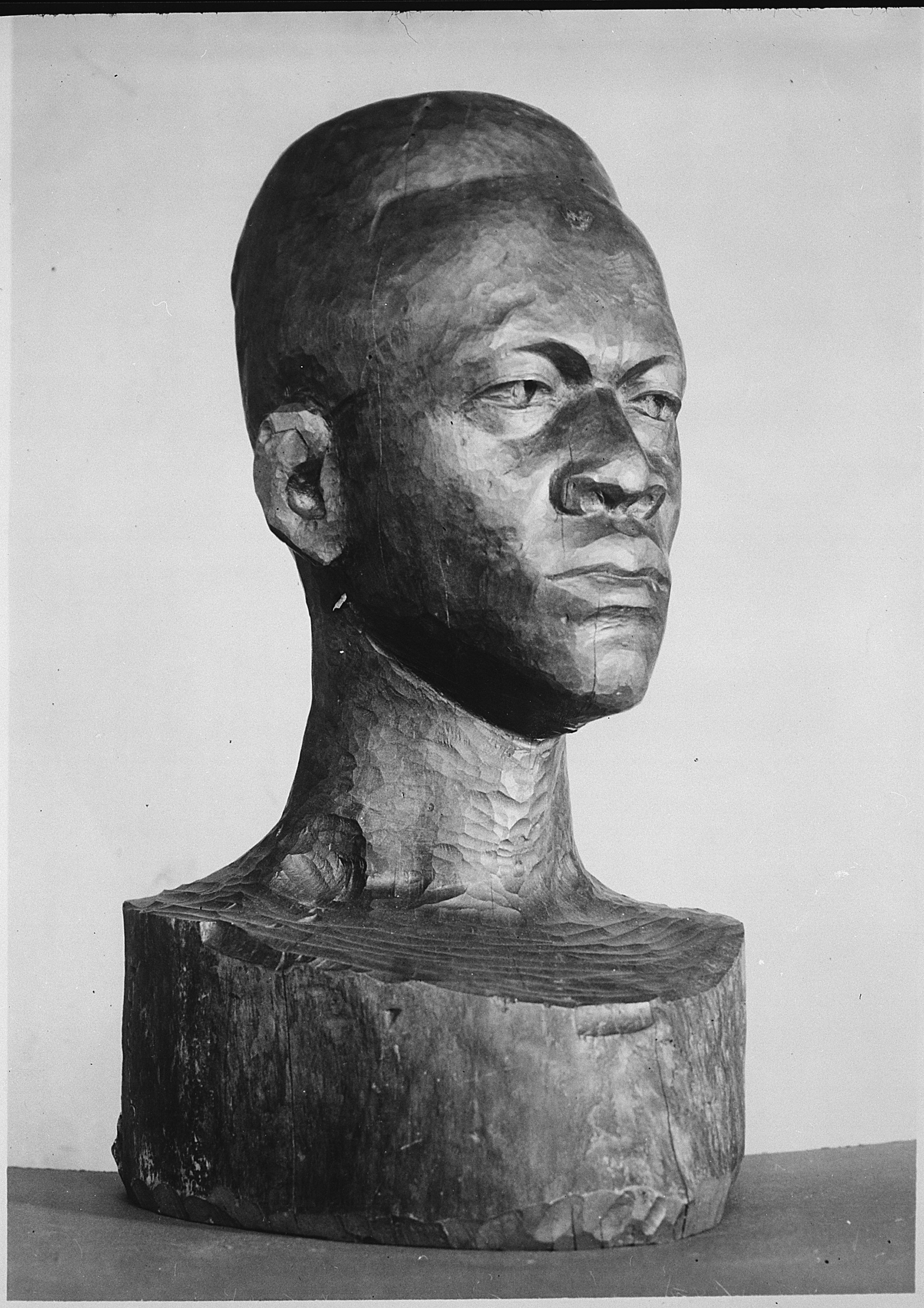 General notes: Sculpture.